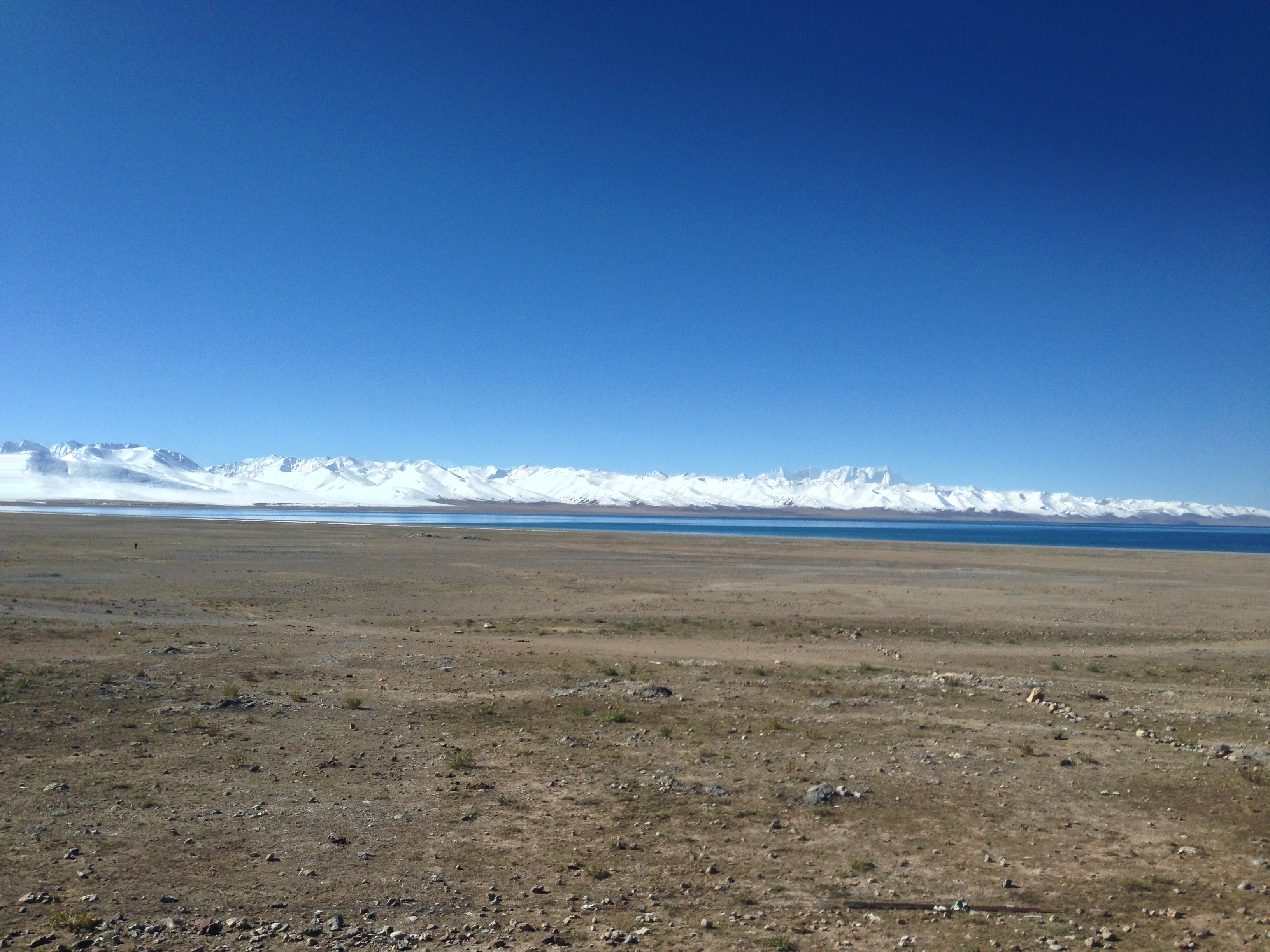 Damxung, Lhasa, Tibet, China